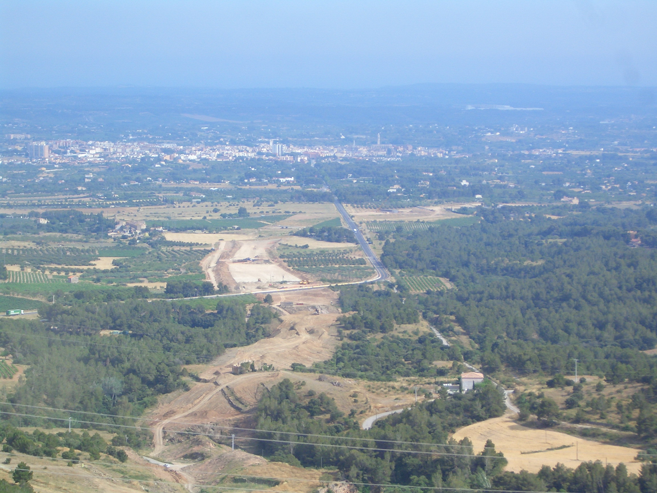 Estat de les obres a l'A-27, tram Valls - Montblanc (juliol 2009)